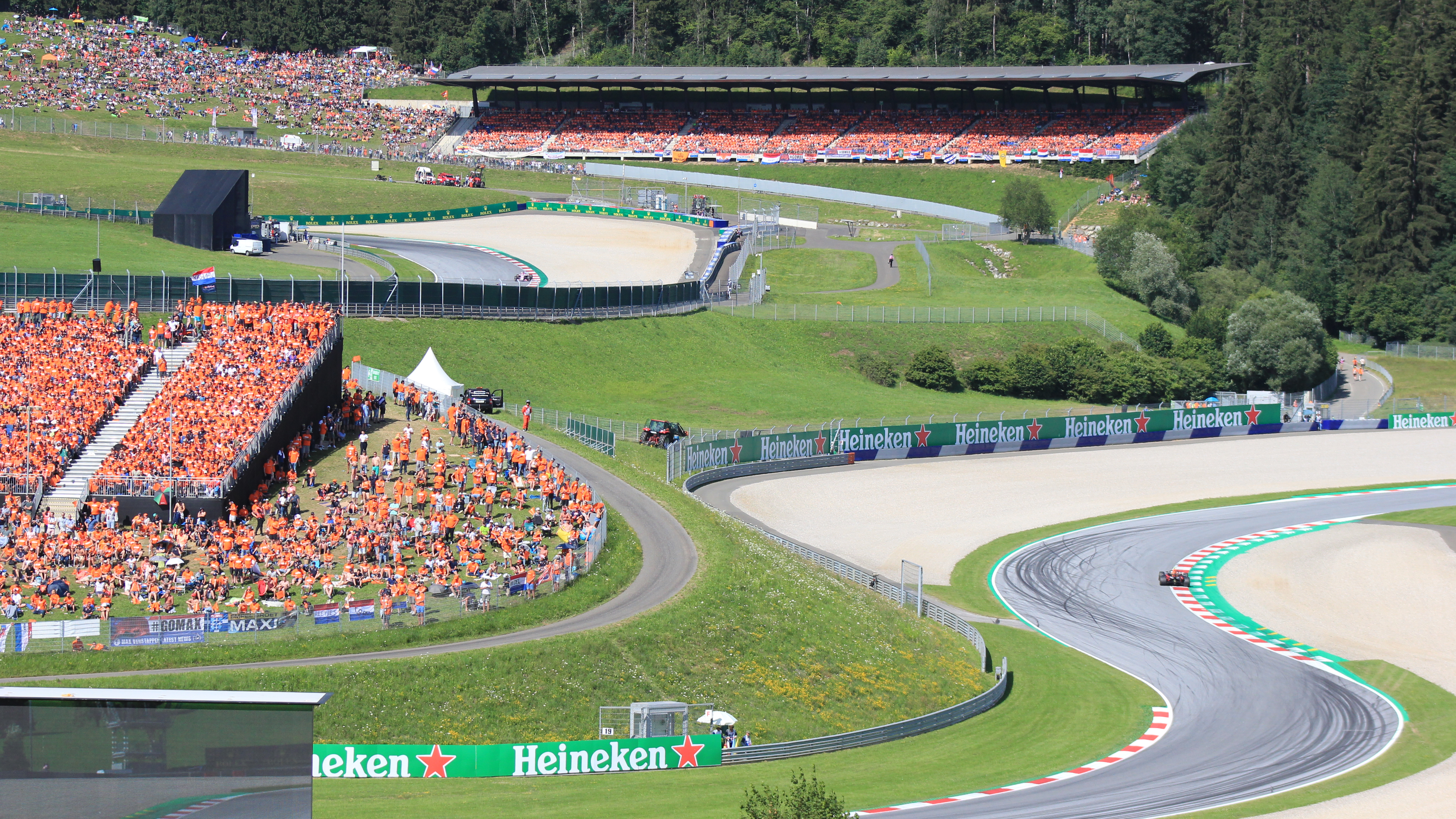 Szenen vom Rennen (Verstappen vor der Tribüne seiner Fans kurz vor dem Rennende)